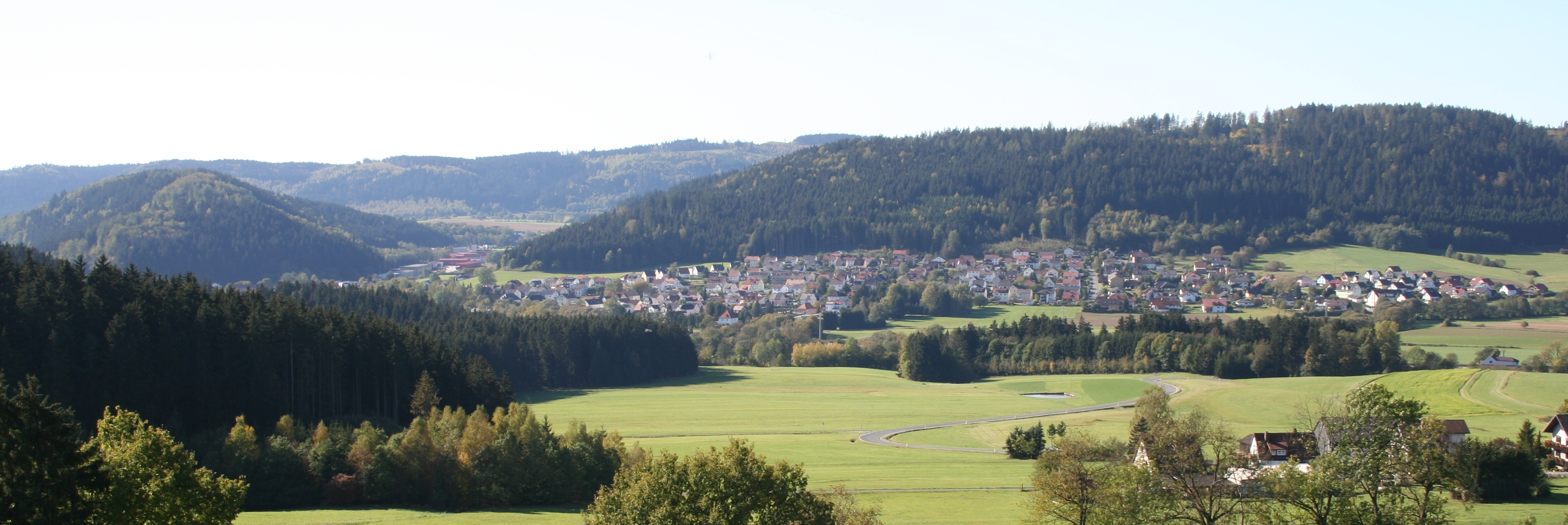 Blick auf Pressig (Standort: oberhalb von Brauersdorf)